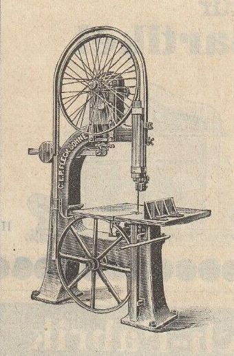 C. L. P. Fleck Söhne. Berlin-Reinickendorf